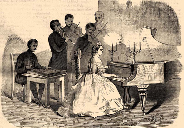 Gróf Nákóné és czigányai a nemzeti szinpadon (az april 3. és 4-én tartott műkedvelői előadásokon.)